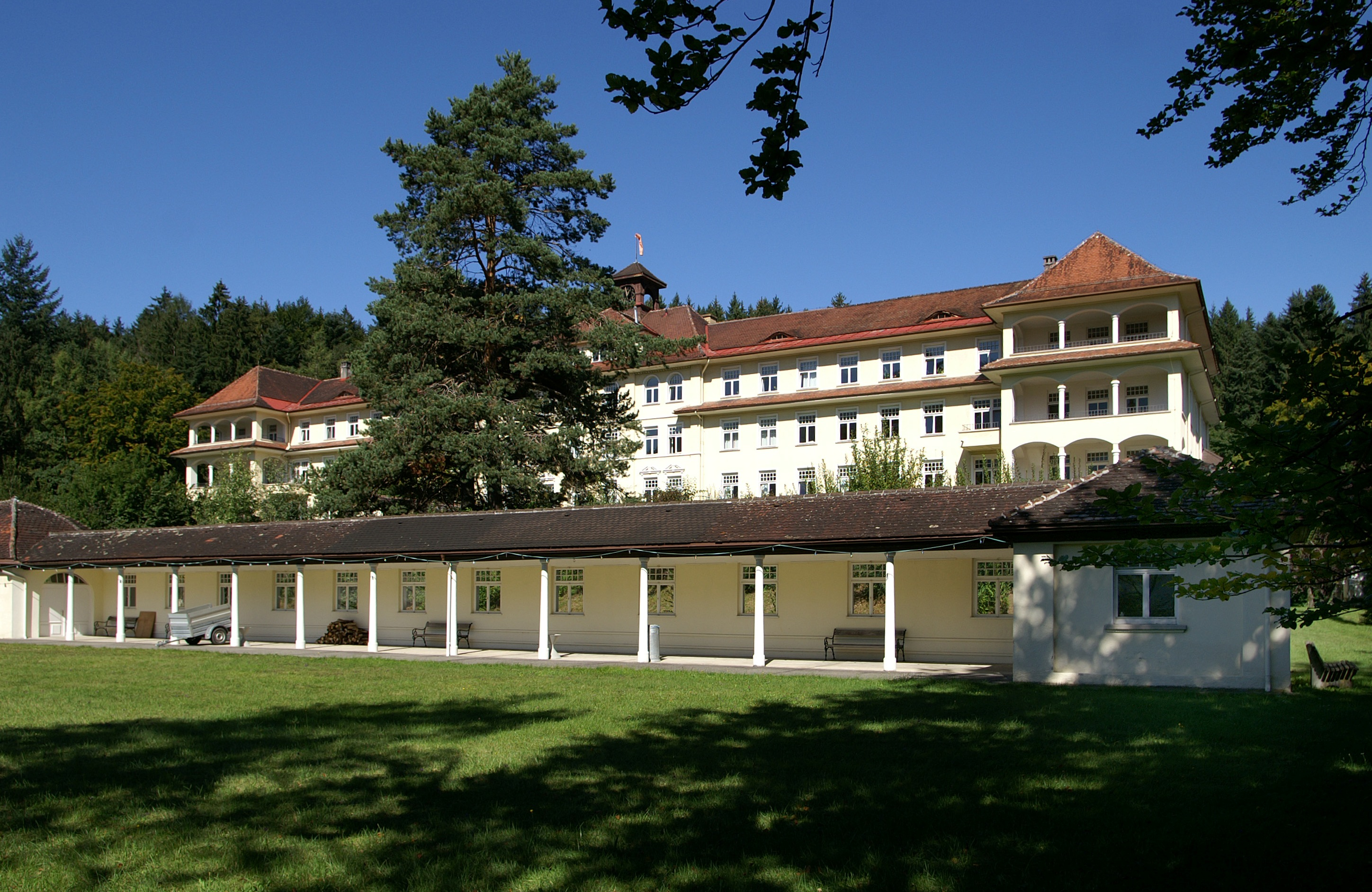 ehemals Pulmologie (Lungenheilkunde) Fachabteilung des LKH - Feldkirch, in Bludesch,Auftraggeber: Land Vorarlberg, Architekt: Willibald Braun Baujahr 1917/21